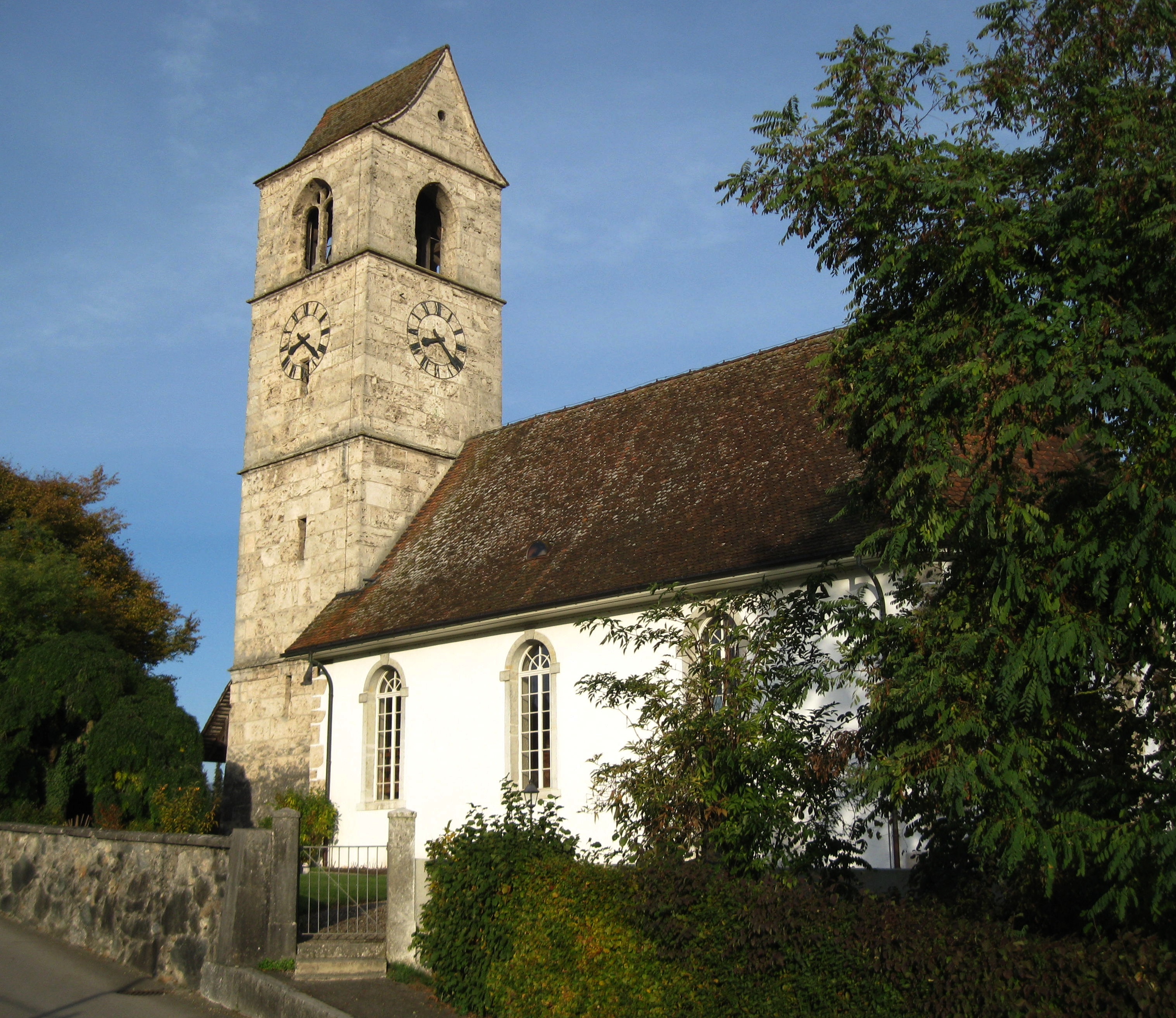 Kirche Lüsslingen Bucheggberg Solothurn